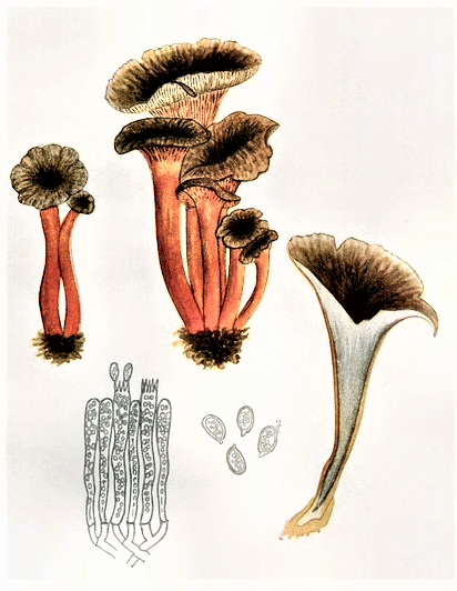 Giacomo Bresadola: Cantharellus tubiformis (1929)